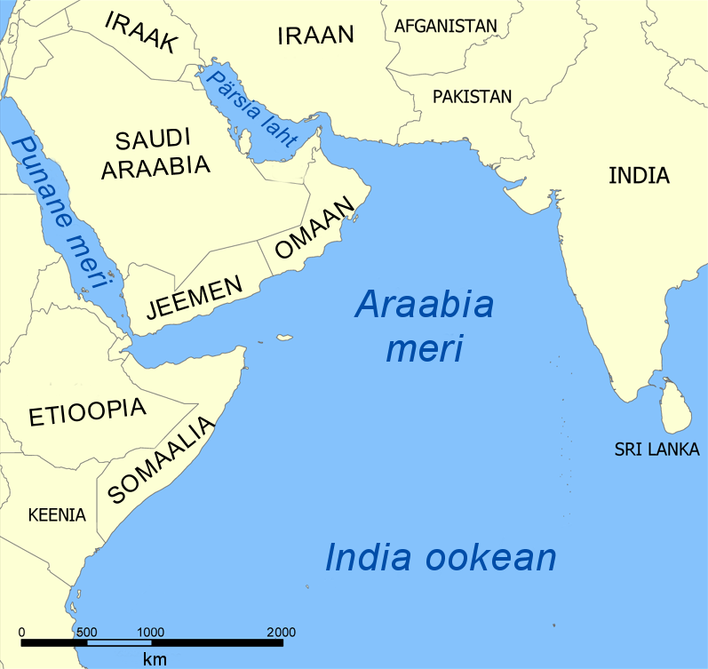 Araabia mere kaart